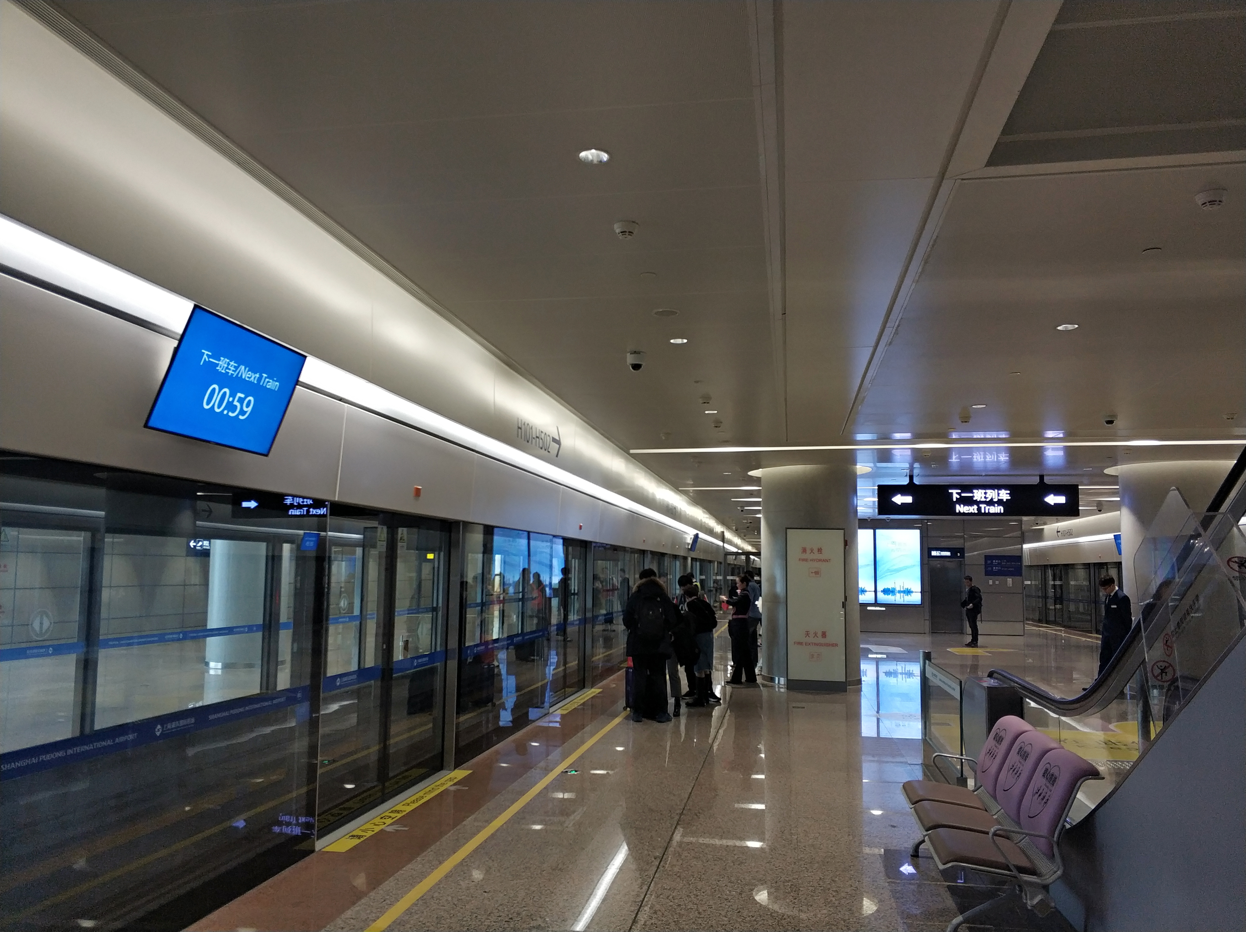 中文（中国大陆）: 上海浦东机场捷运西线T1站